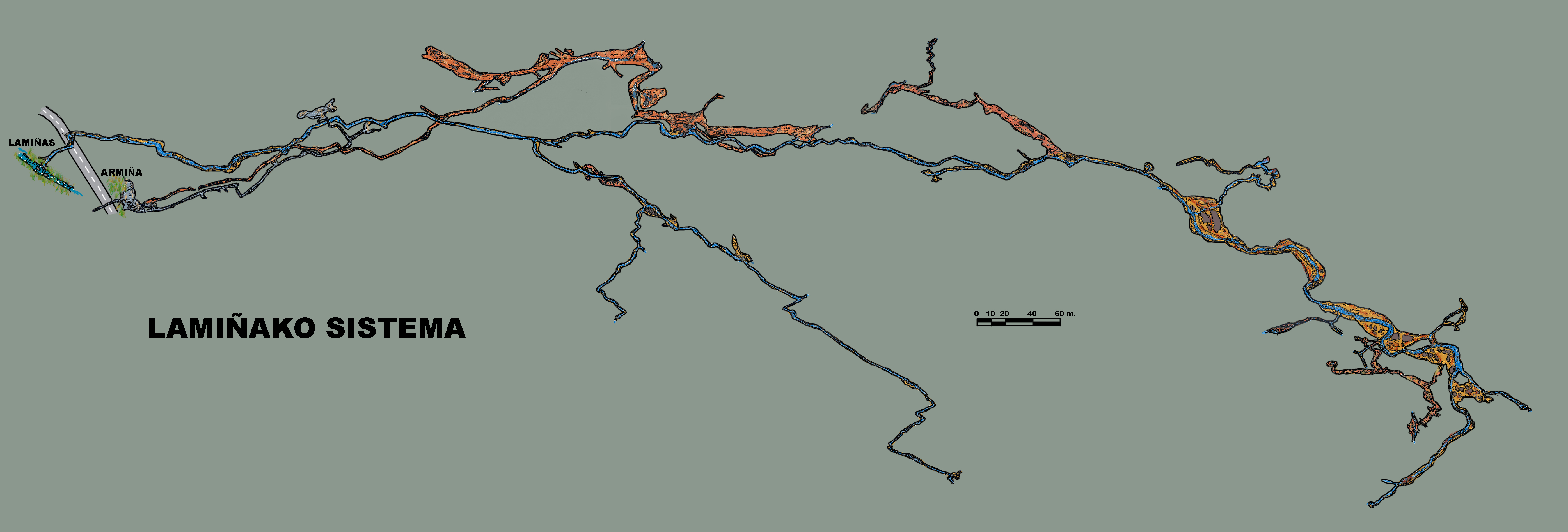 Topografía del Sistema de las Lamiñas. ADES.